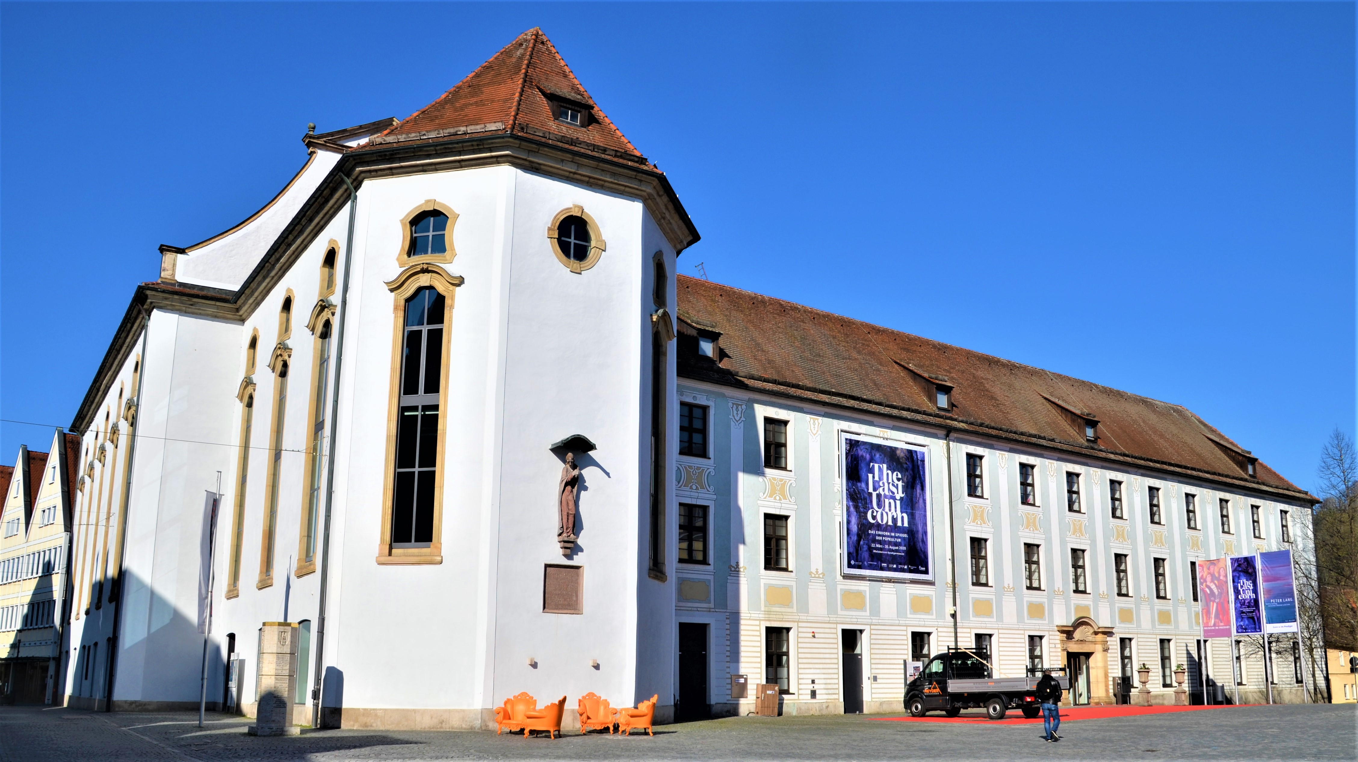 Prediger Schwäbisch Gmünd vom Johannisplatz aus aufgenommen, links Bocksgasse, Stauferstele